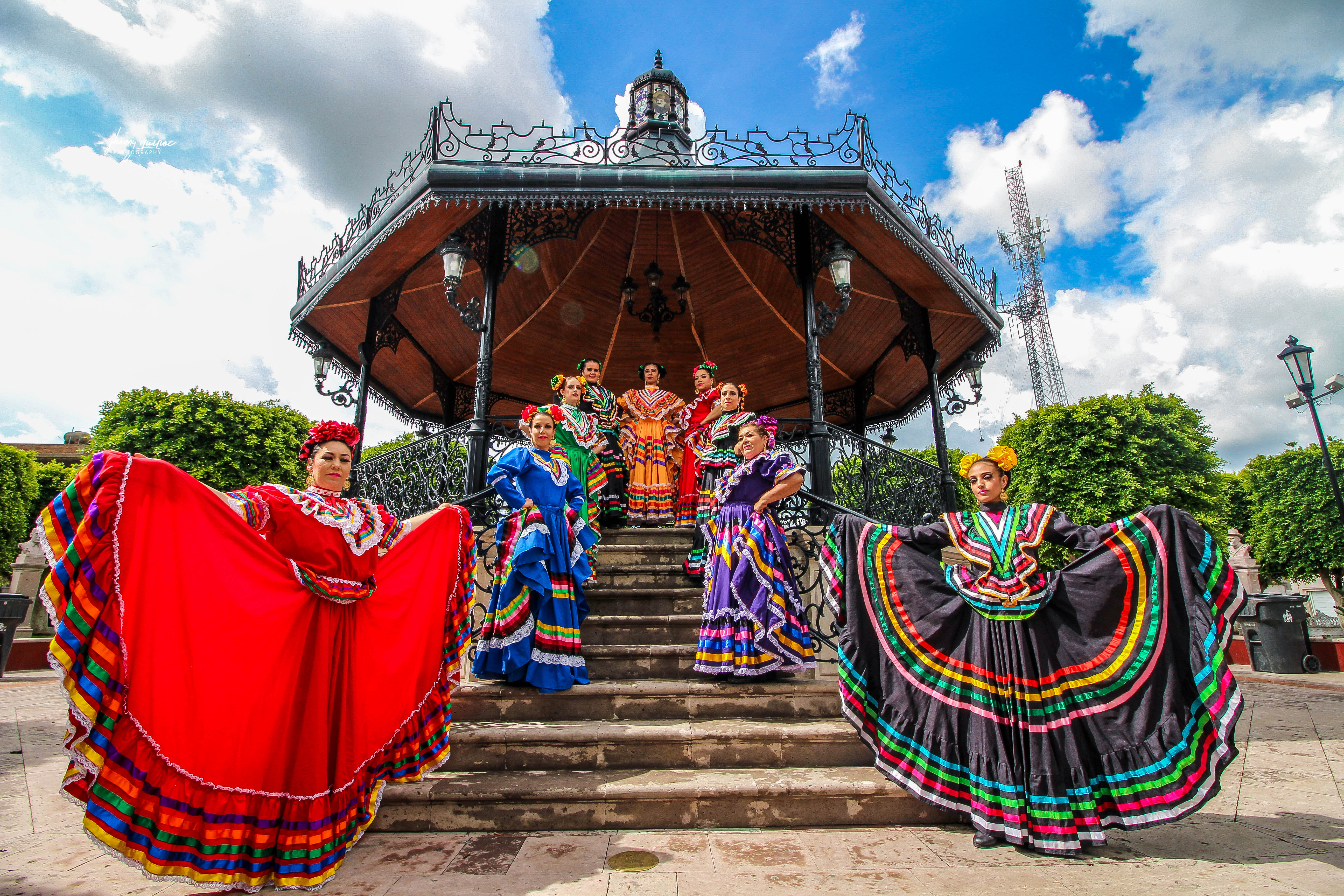 Bailarinas del Grupo Cristeros en el Kiosko de la ciudad